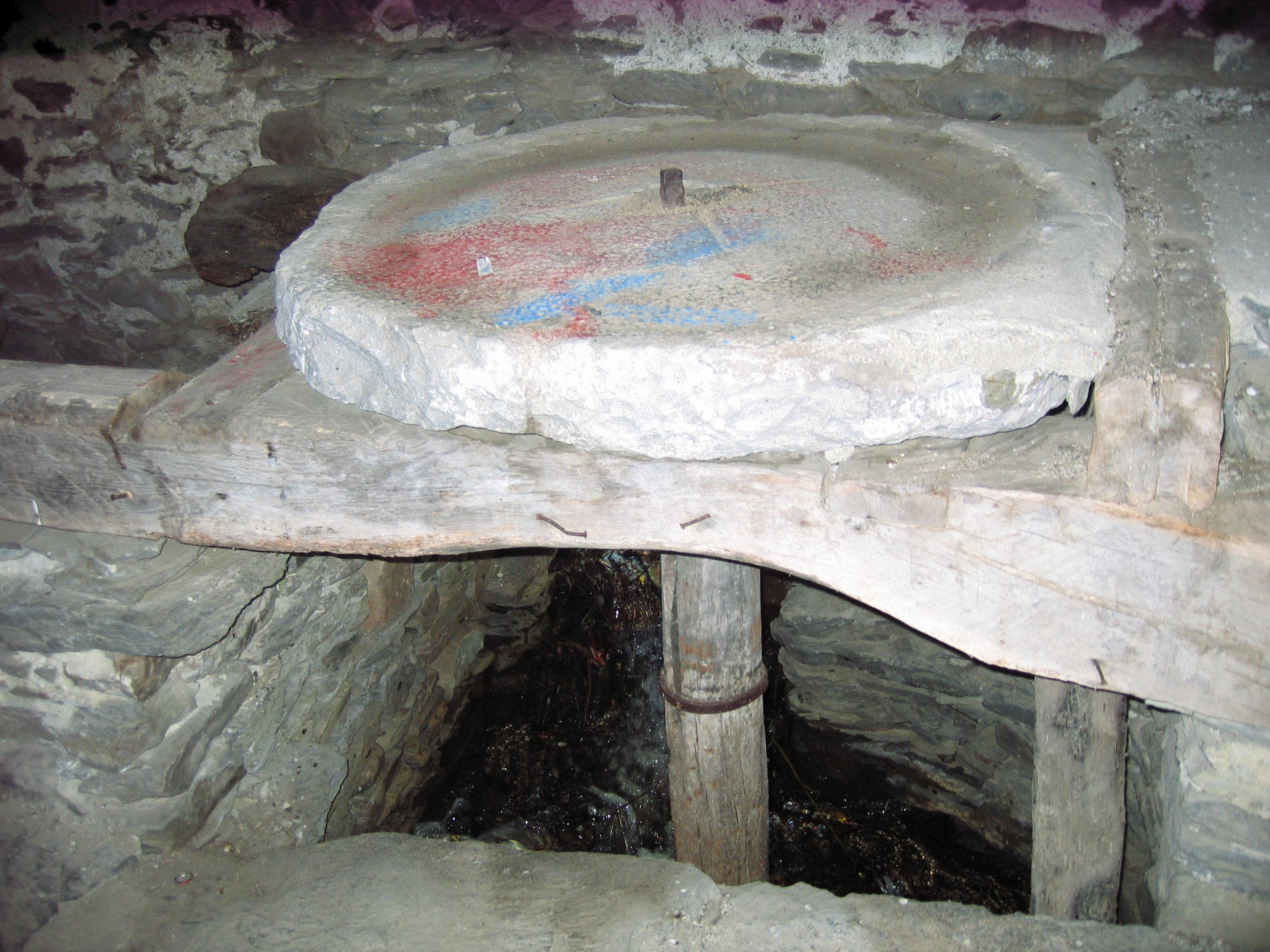 Molino de rodezno en las afueras de Murias de Paredes, León, España